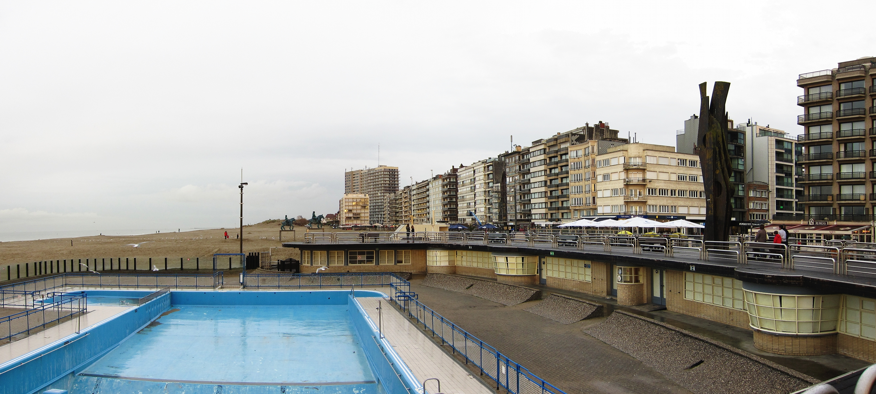 La piscine et la promenade sur la plage d'Oostduinkerke.